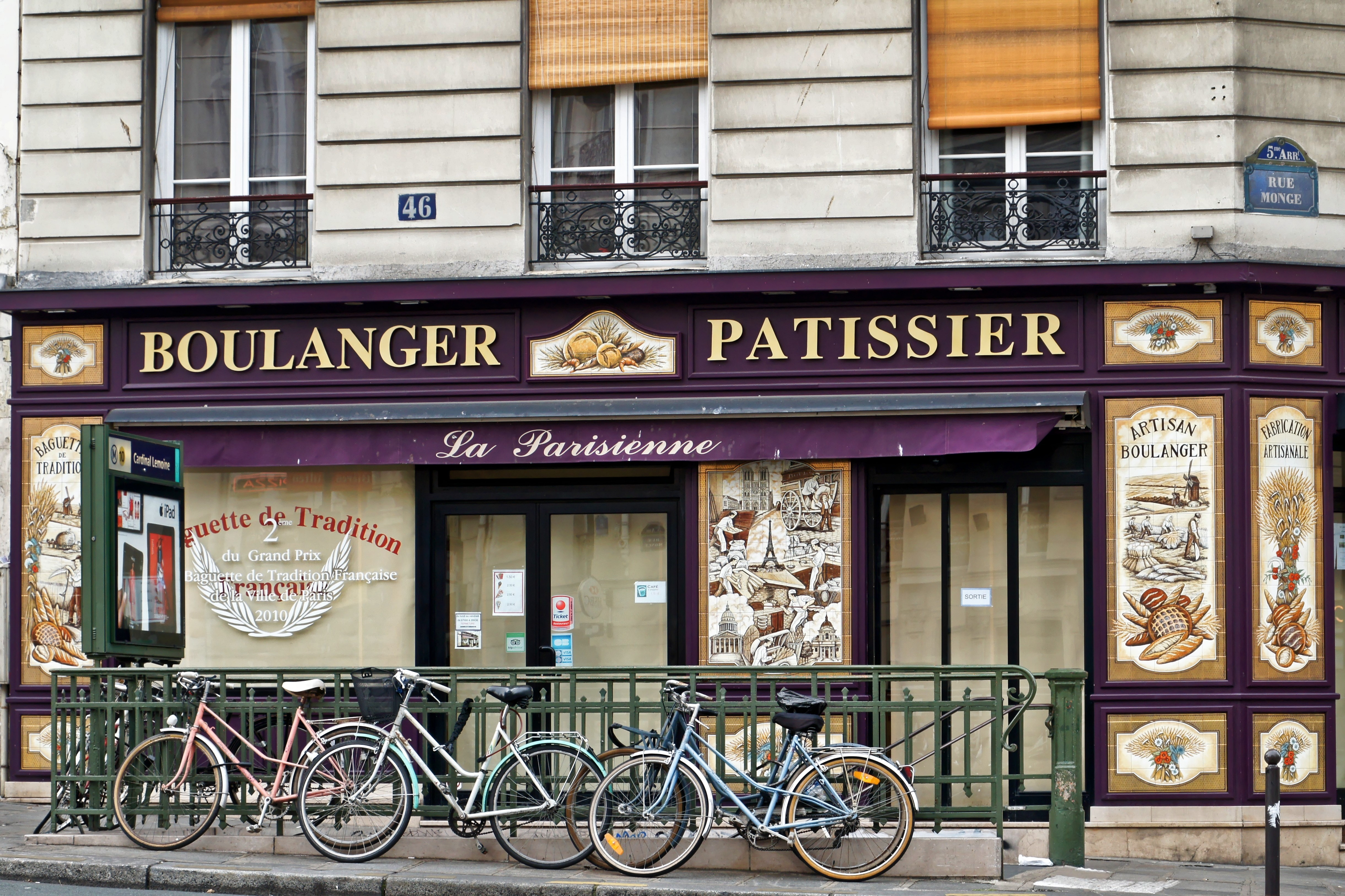 Belle devanture